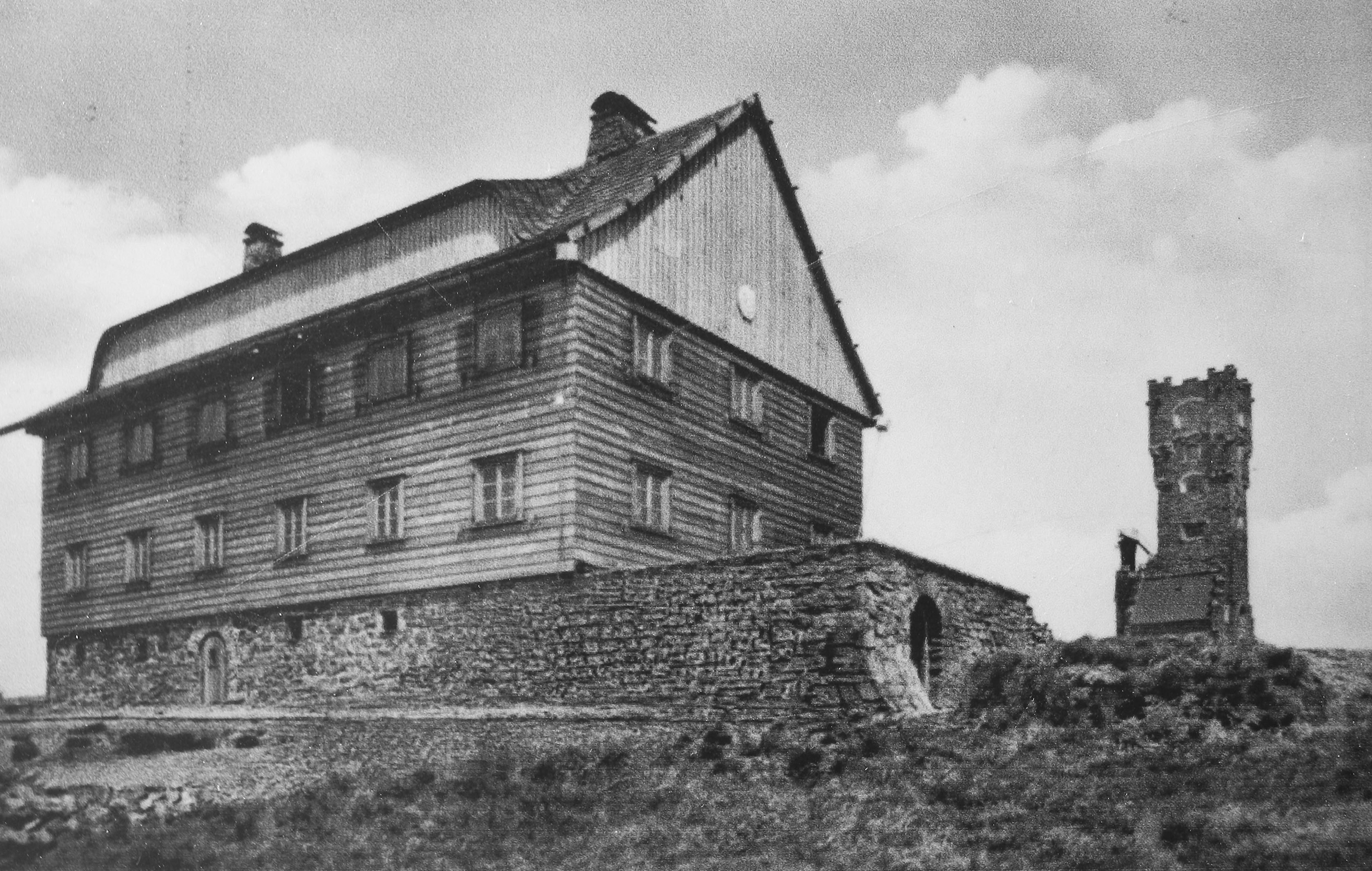 Baude und Habsburgwarte auf dem Altvater (1491 m) im Altvatergebirge (von 1912–1958)